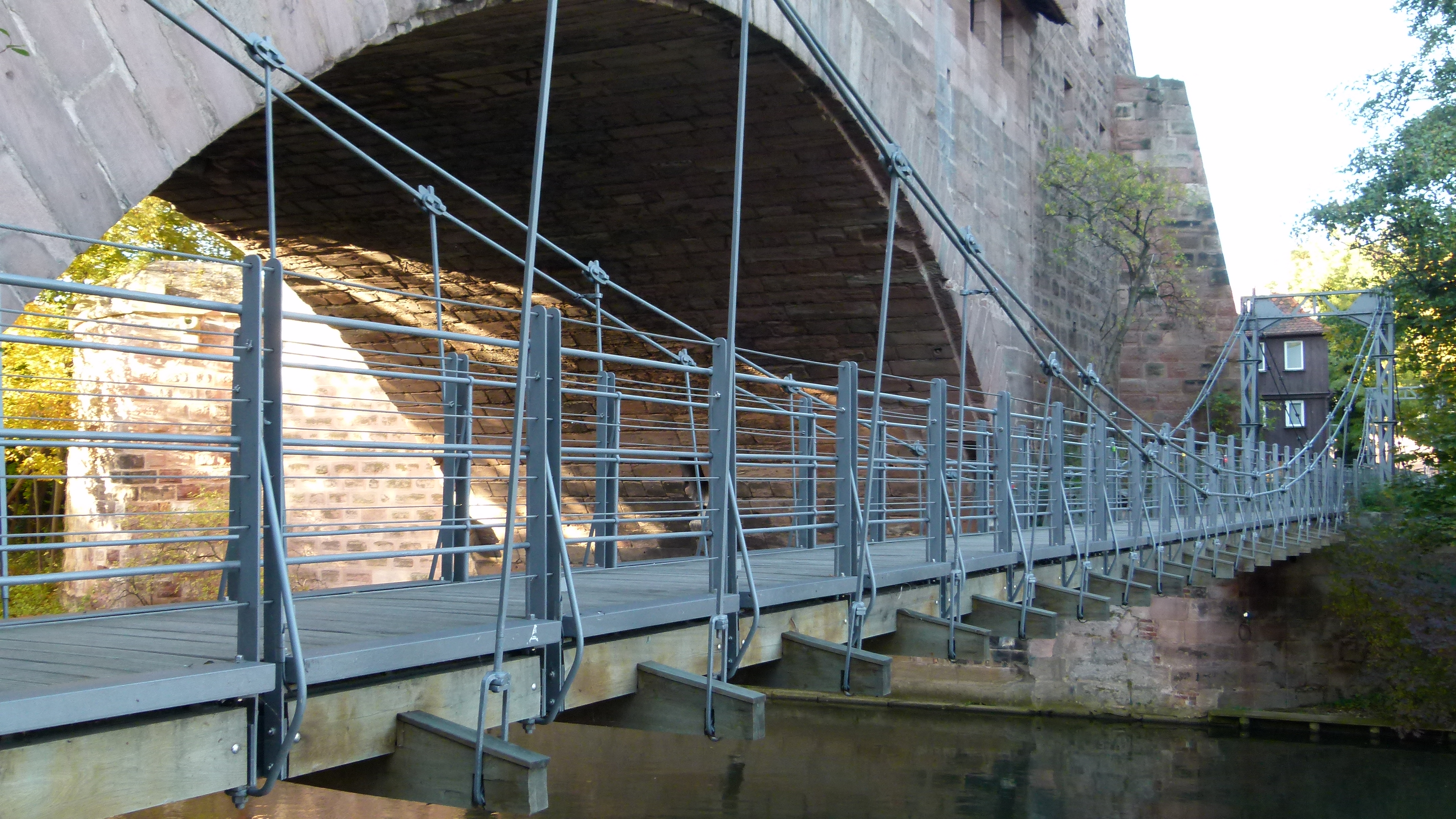 Kettensteg, Fußgängerbrücke in Nürnberg, Bayern